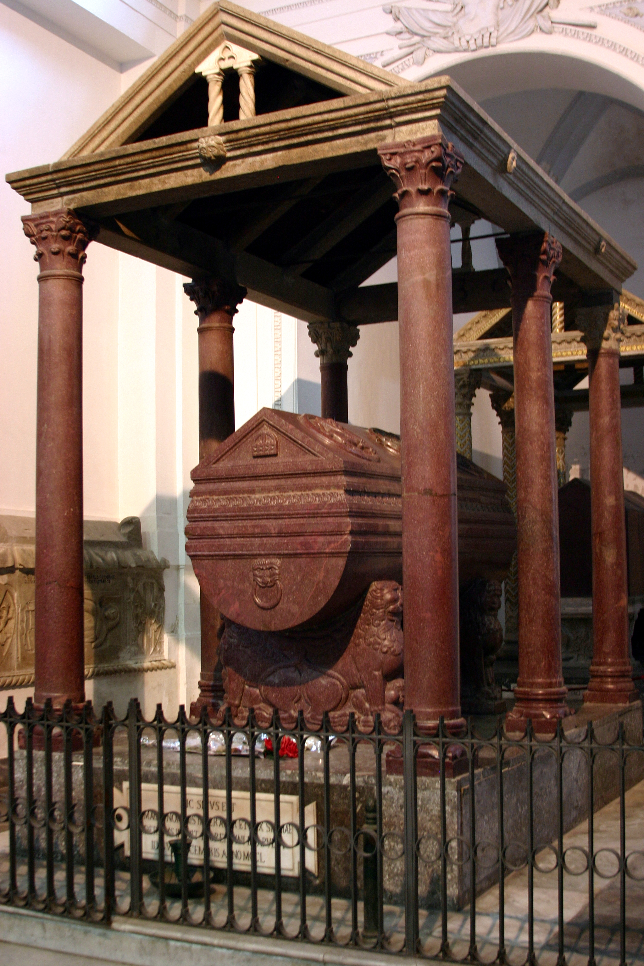 Cathedral of Palermo